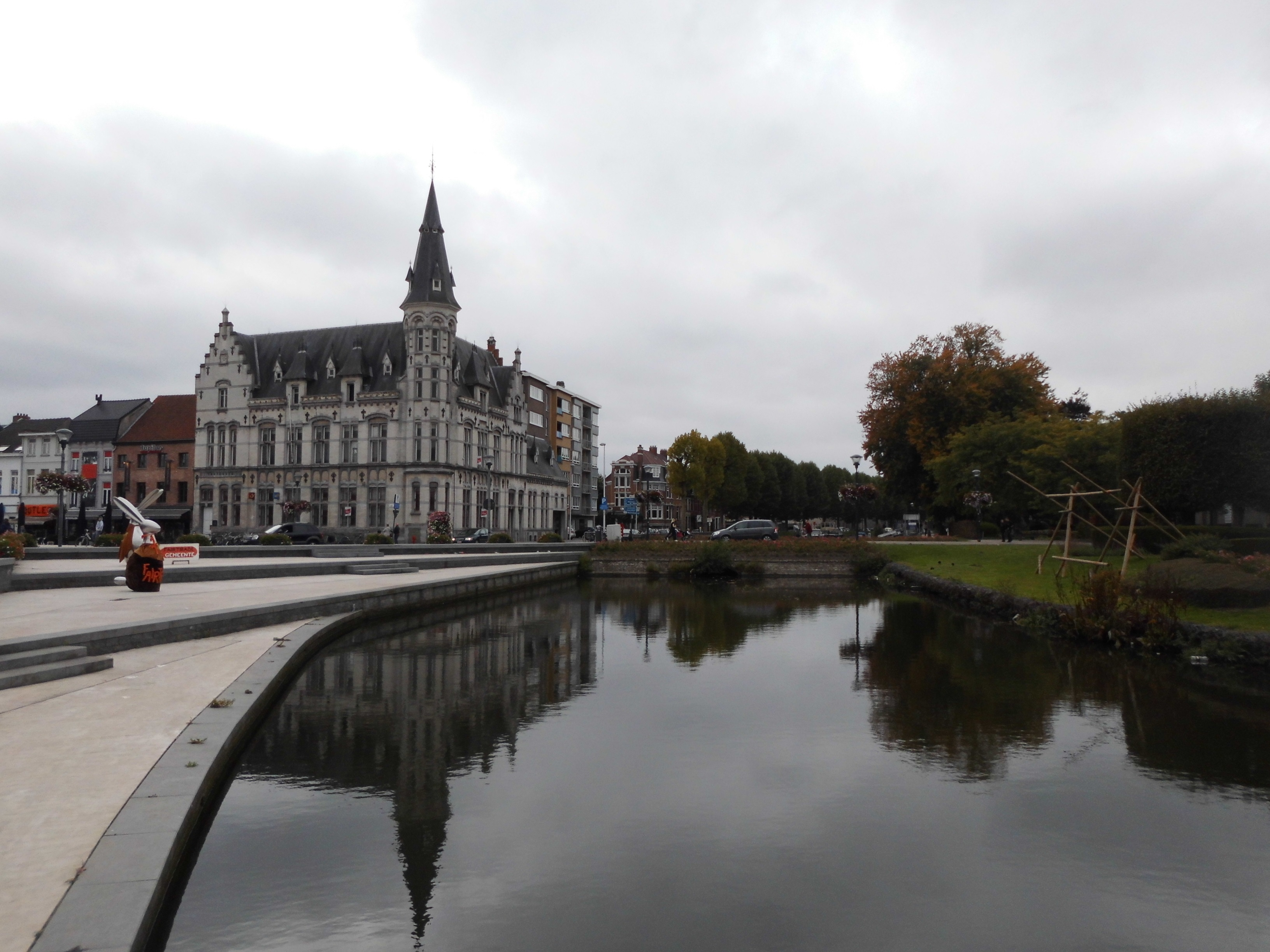 Postkantoor (aan de Durme) - Markt - Lokeren - Oost-Vlaanderen - België